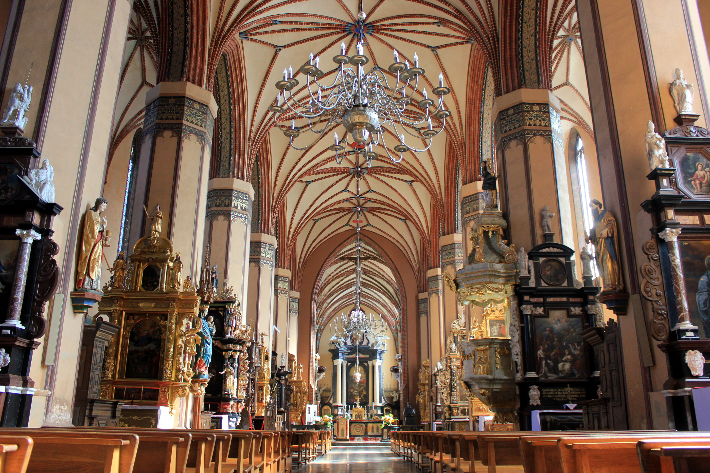 Hornjoserbsce: Frauenburger Dom, Innenansicht.